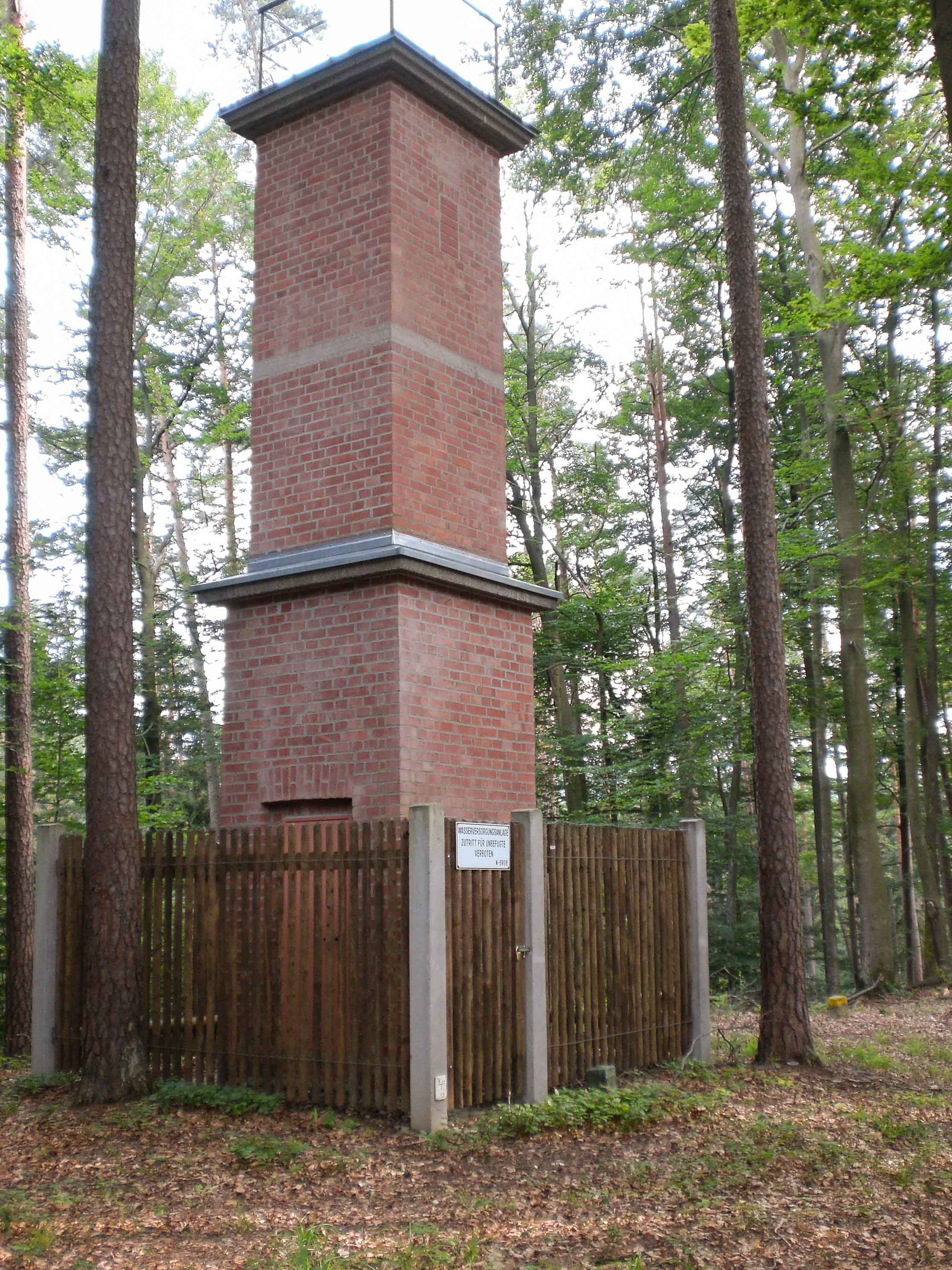 Wasserturm, Brunn, Lorenzer Reichswald